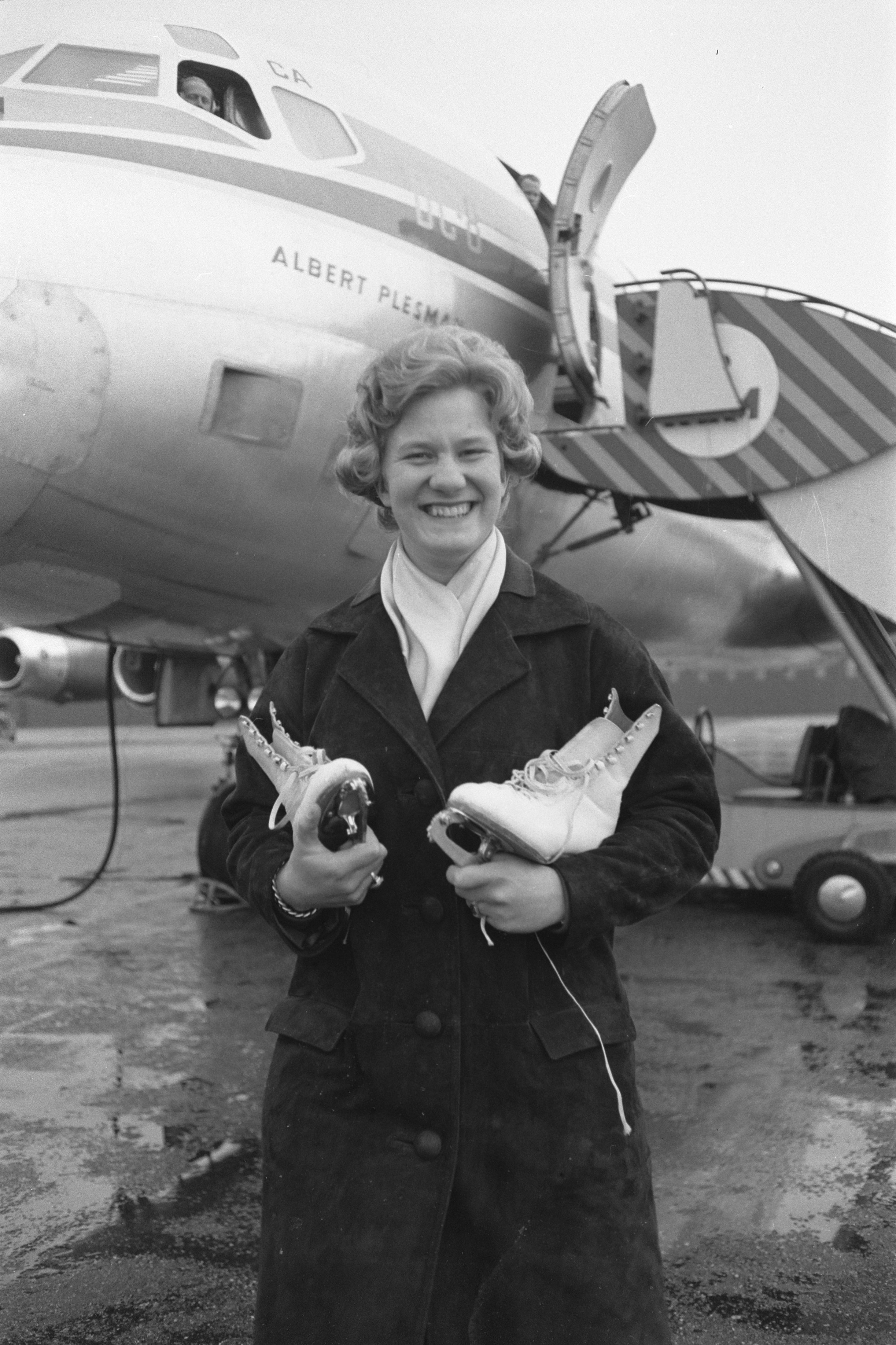 Collectie / Archief : Fotocollectie Anefo Reportage / Serie : [ onbekend ] Beschrijving : Vertrek van Sjoukje Dijkstra naar Montreal van Schiphol Datum : 4 april 1961 Locatie : Noord-Holland, Schiphol Trefwoorden : VERTREKKEN Persoonsnaam : Dijkstra, Sjoukje Fotograaf : Pot, Harry / Anefo Auteursrechthebbende : Nationaal Archief Materiaalsoort : Negatief (zwart/wit) Nummer archiefinventaris : bekijk toegang 2.24.01.05 Bestanddeelnummer : 912-3024